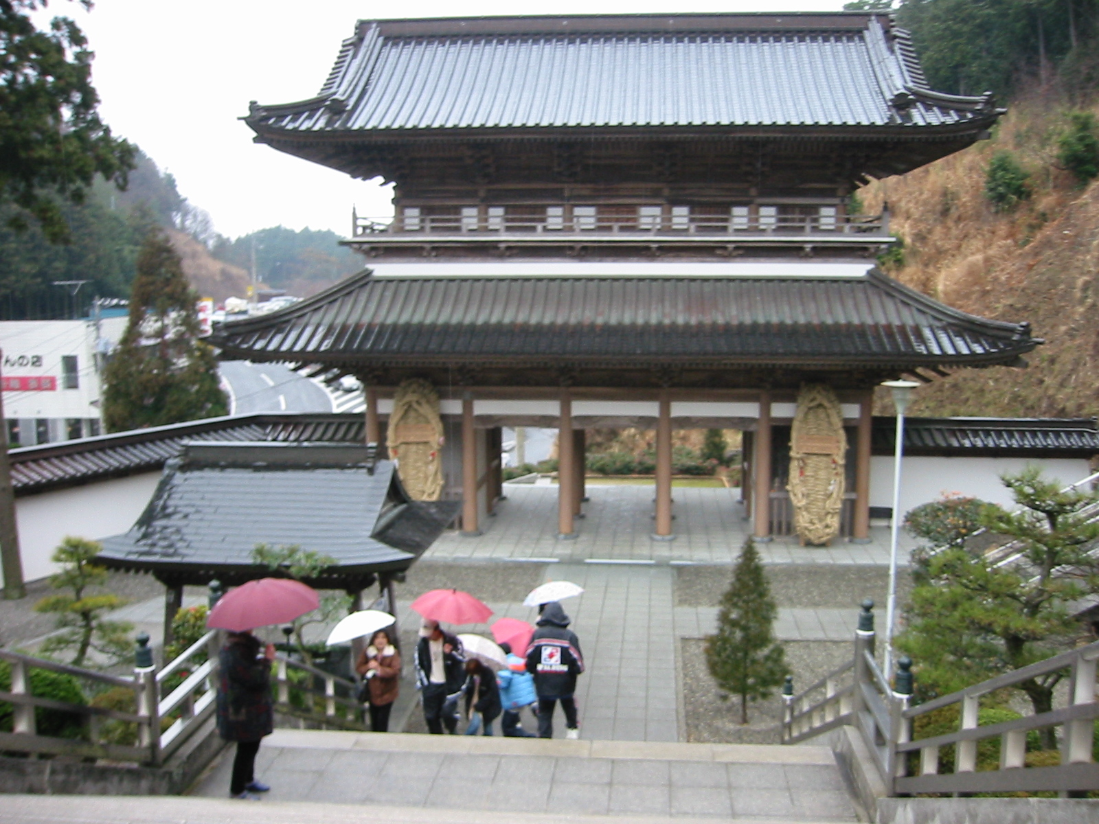 八十八番札所 大窪寺 仁王門